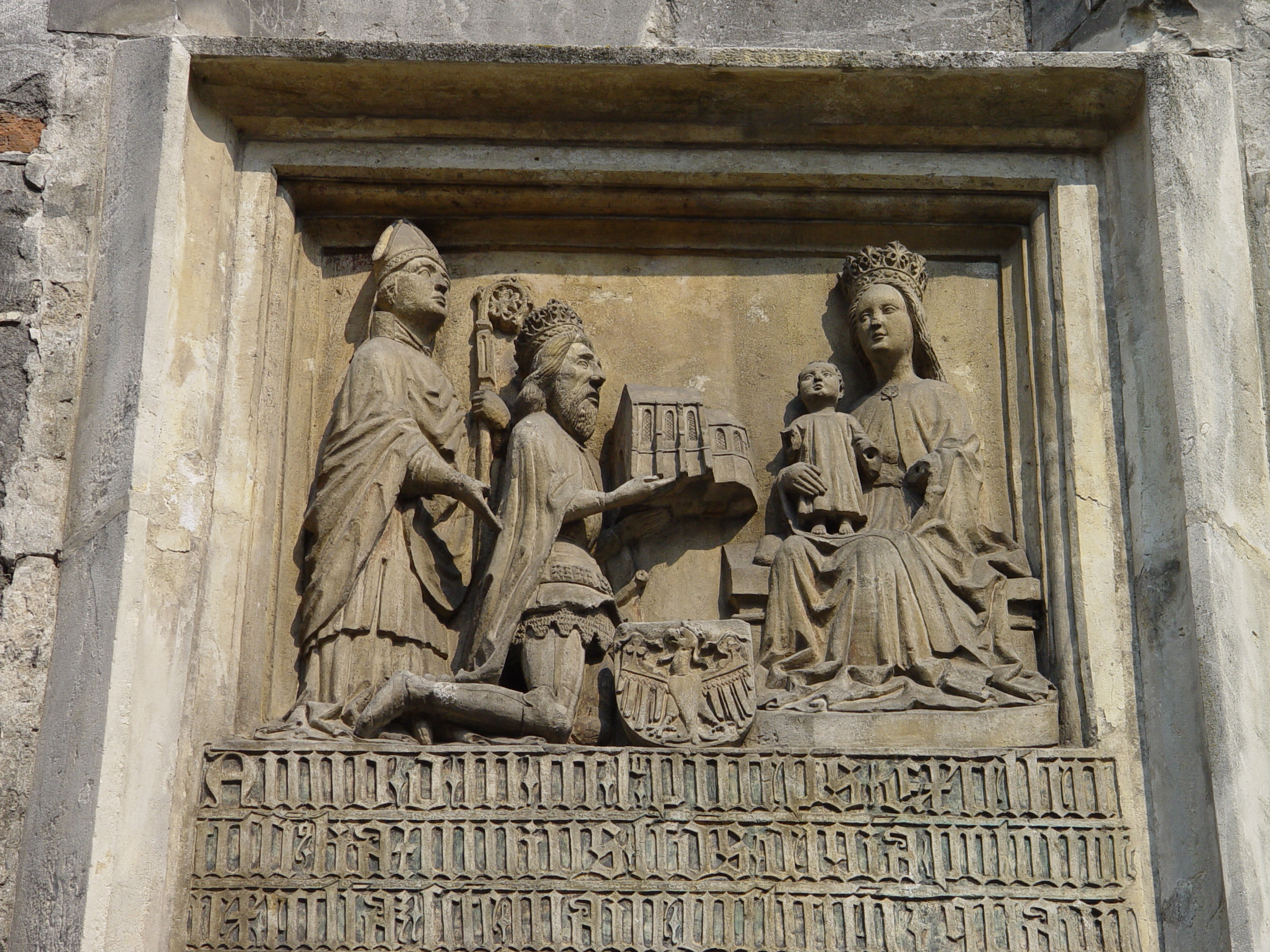 A.85/1-3 z 3.12.1956 i z 21.02.1966